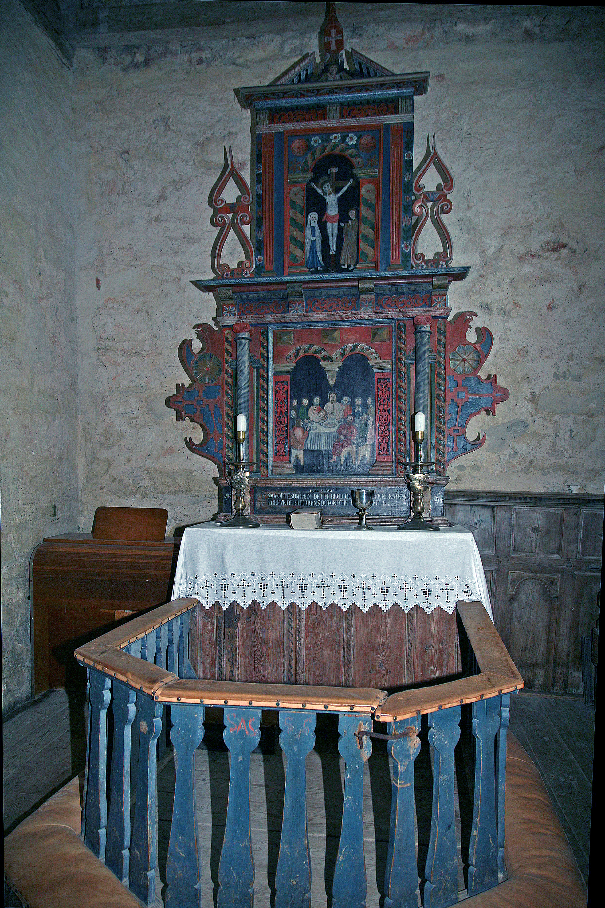 Altertavlen i Moster gamle kirke, Norge